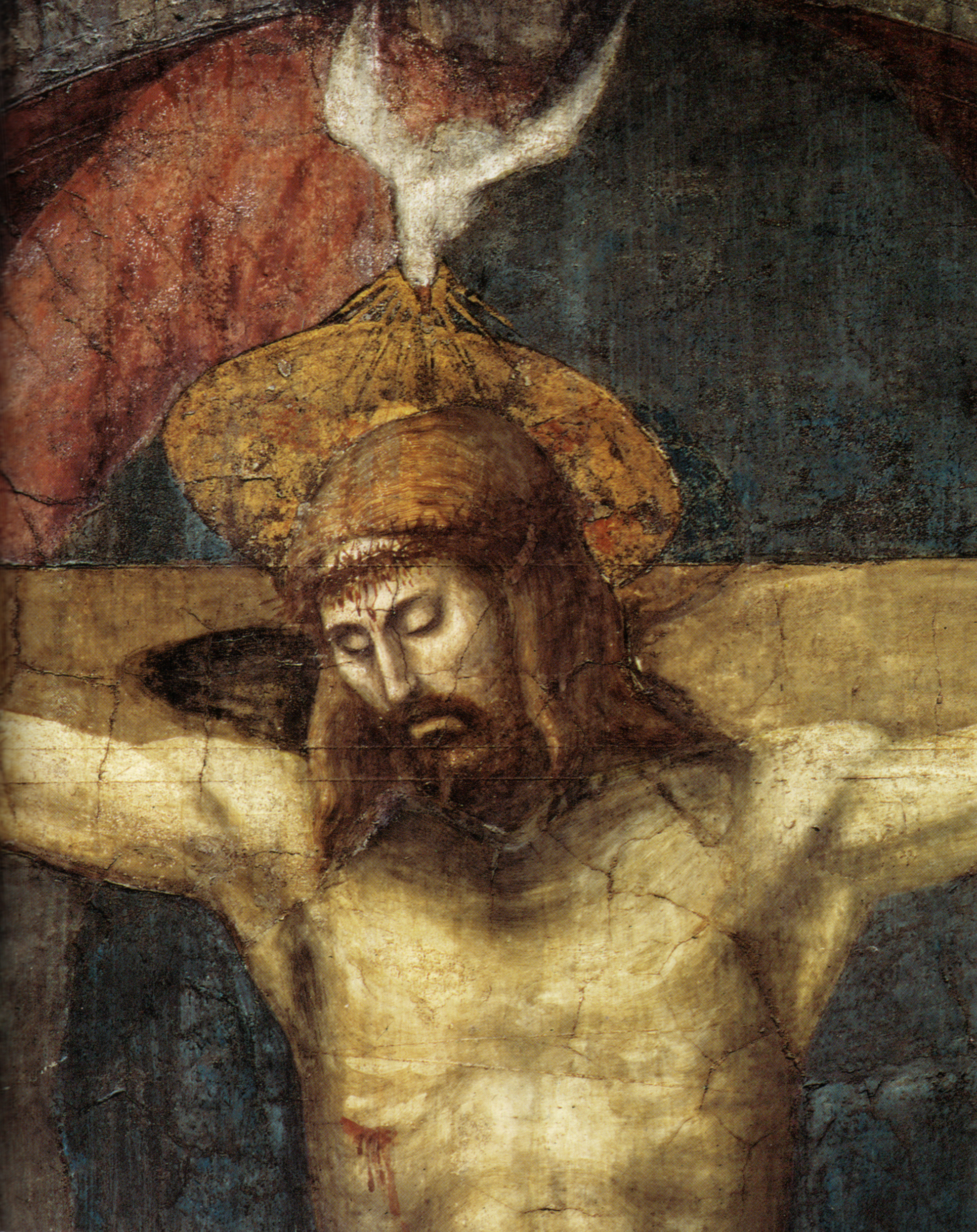 detail